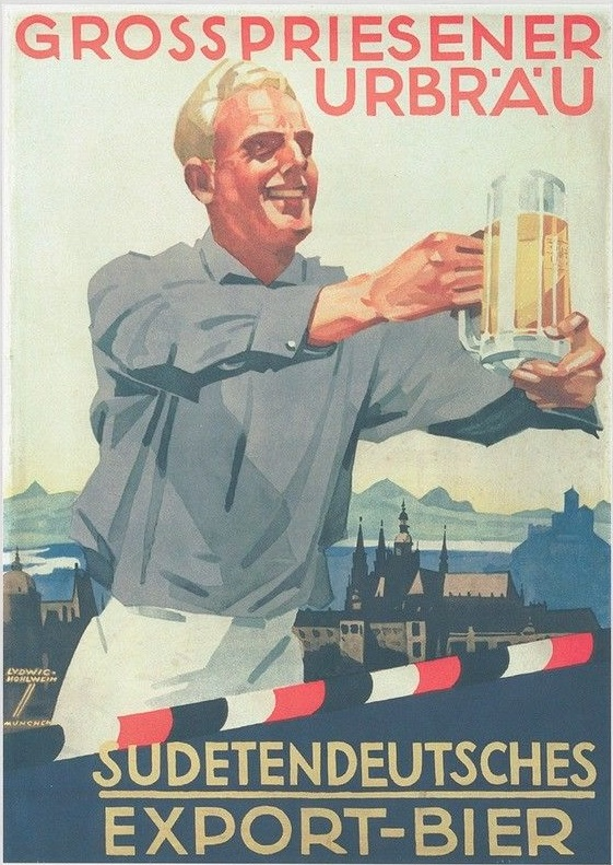 Großpriesener Urbräu Plakat